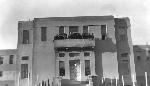 חזית בית חינוך עיוורים בירושלים בעת ביקור הנציב העליון ווקופ